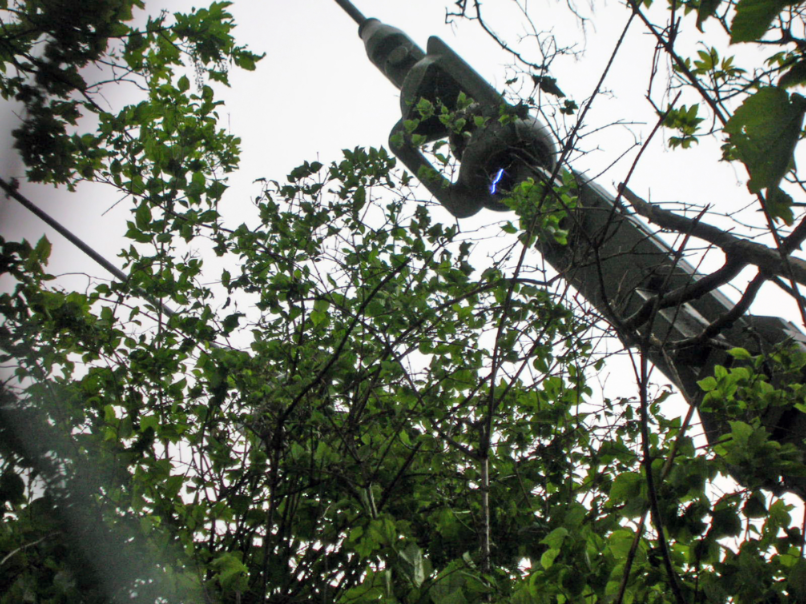 Funkenüberschlag am Abspannseil des Senders Bisamberg während eines Gewitters